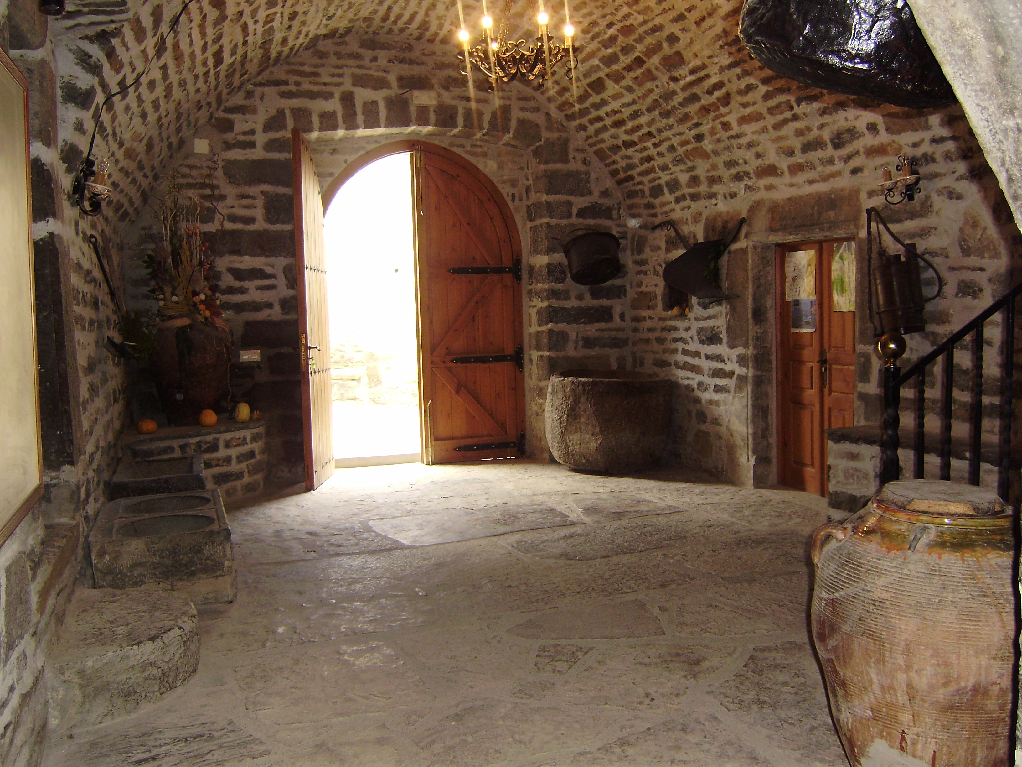 Interior de patio decorado con recipientes antiguos y aperos de labranza típicos del Pirineo de Huesca.